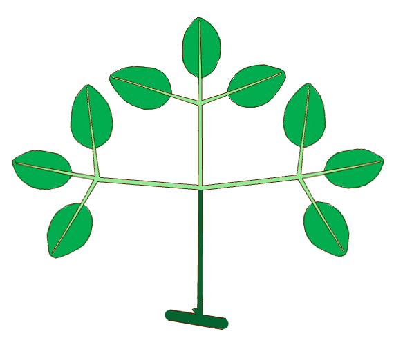 Morfología de la hoja. Tipo: ternadamente compuesta, biternada. Según Simpson (2005) Plant Systematics.